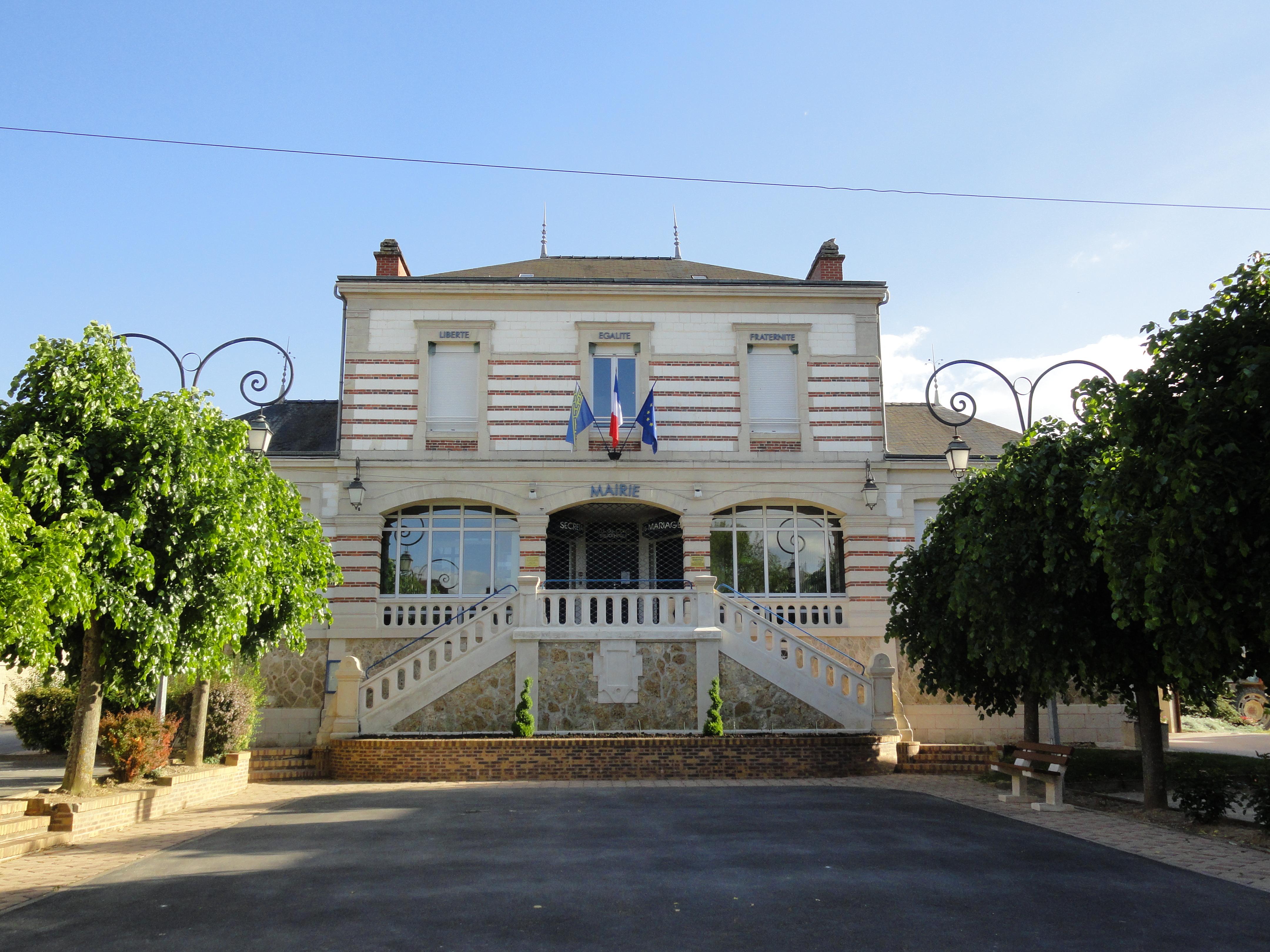 Mairie de Oiry